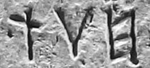 Museo Archeologico Nazionale dell'Umbria - Cippo perugino - dettaglio - iscrizione hut = 4 ?